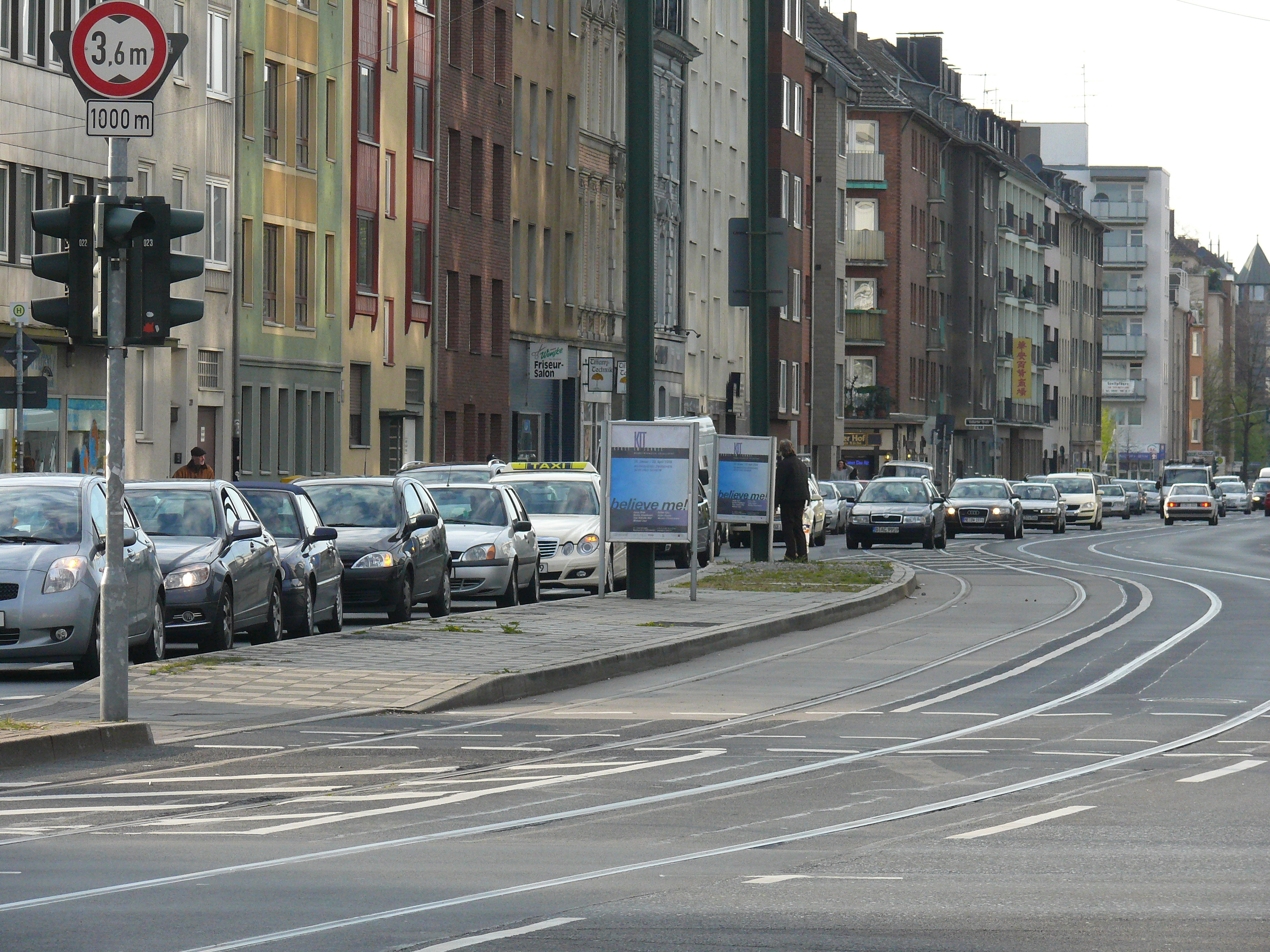 Ehemaliger Halt am U-Bahnhof Oberbilker Markt (Westseite)